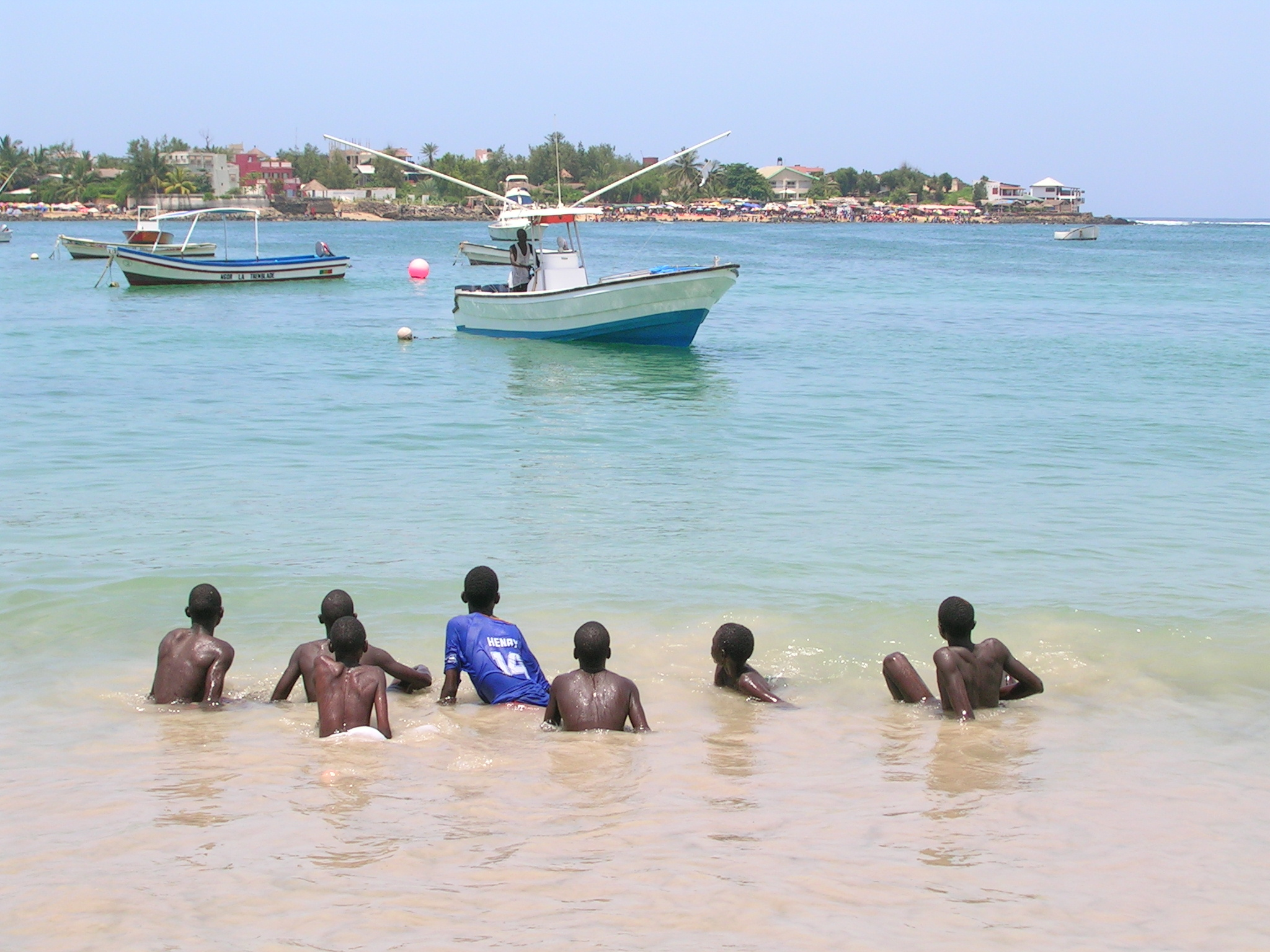 L'île de Ngor contemplée depuis le village de Ngor (Sénégal)